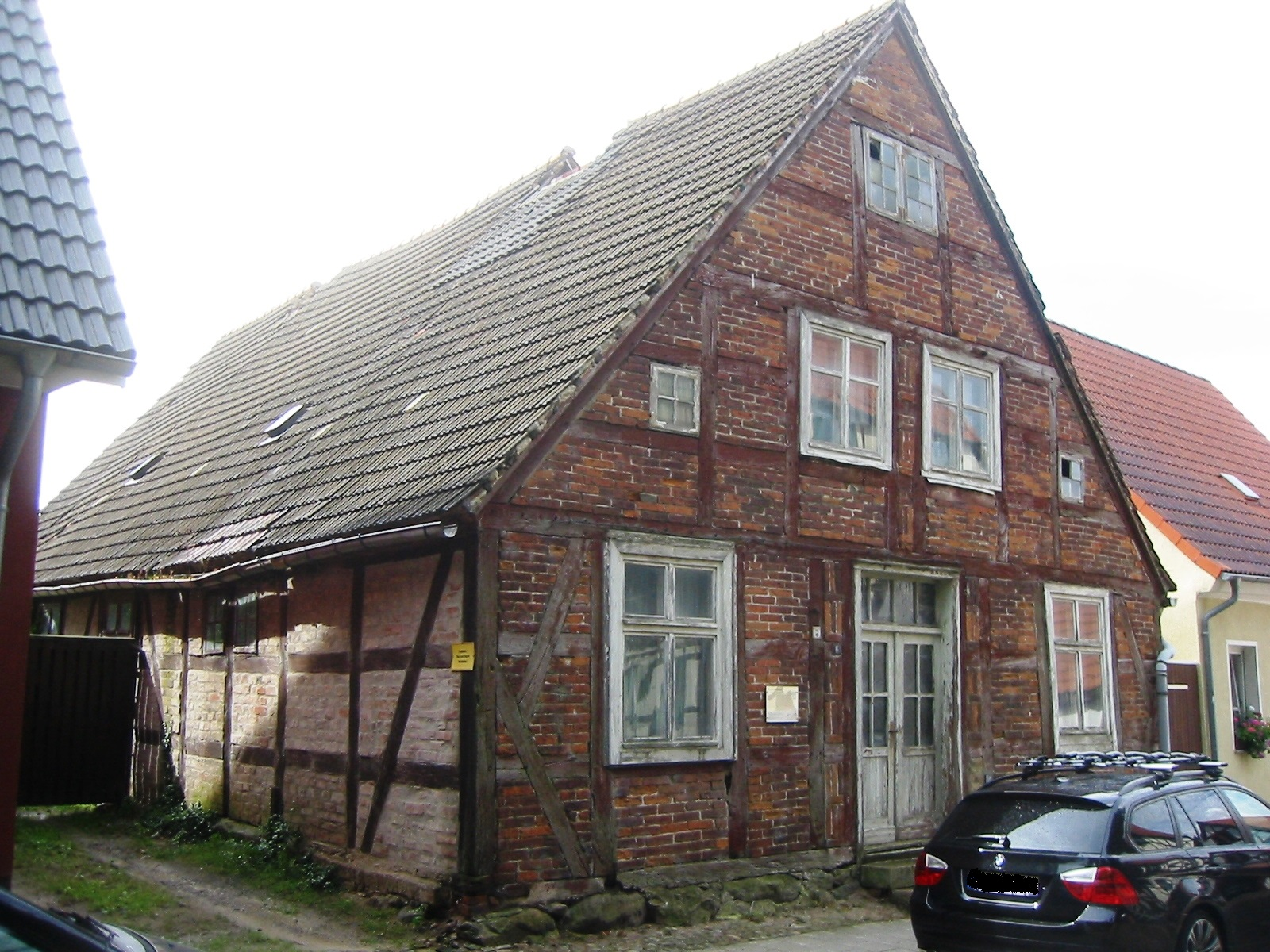 Sogenannte "Kirchenbude", ein denkmalgeschütztes Bauwerk in der Schulstraße 6 in Grimmen, Mecklenburg-Vorpommern